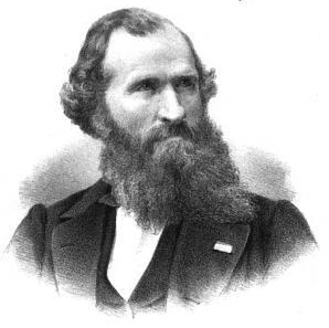 Norsk (bokmål): Johan Fredrik Eckersberg (1822–1870)